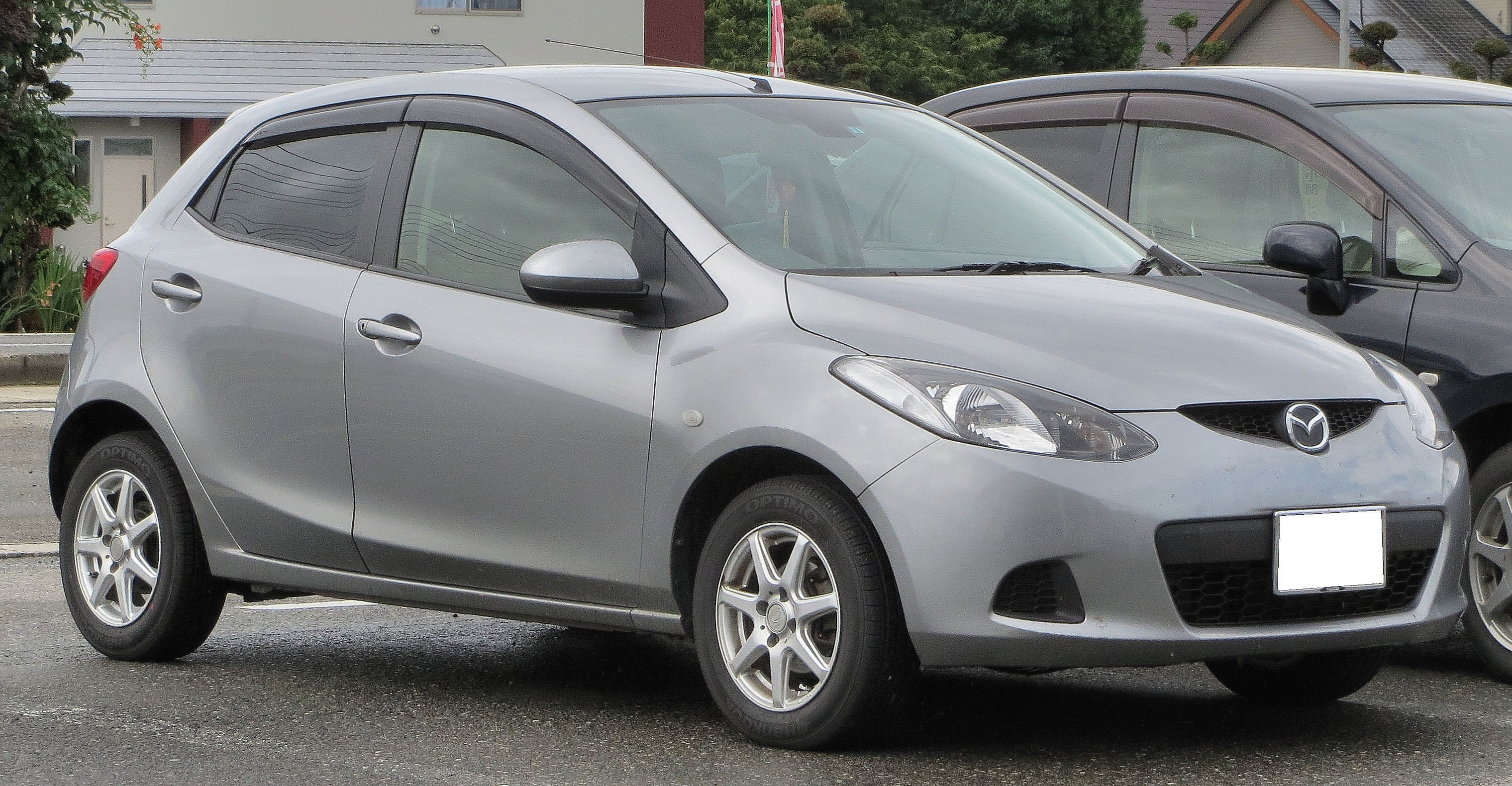 マツダ デミオ 13C-V 前期型